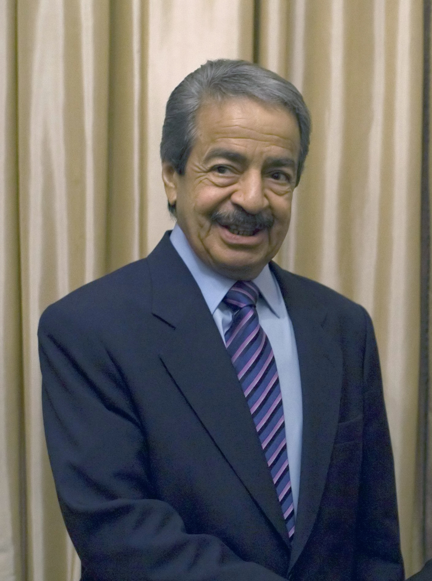 นายกรัฐมนตรีแห่งบาห์เรนเข้าพบนายกรัฐมนตรีในโอกาสเสด็จเยือนไทย ณ ห้องพญานาค บ้านพิษณุโลก วันพฤหัสบดี ที่ 26 สิงหาคม พ.ศ.2553 (Photographer attached to the Prime Minister of the Kingdom of Thailand : Peerapat Wimolrungkarat / พีรพัฒน์ วิมลรังครัตน์)